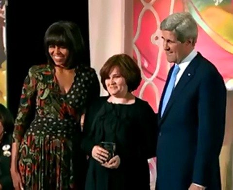 Журналист "Новой газеты" Елена Милашина